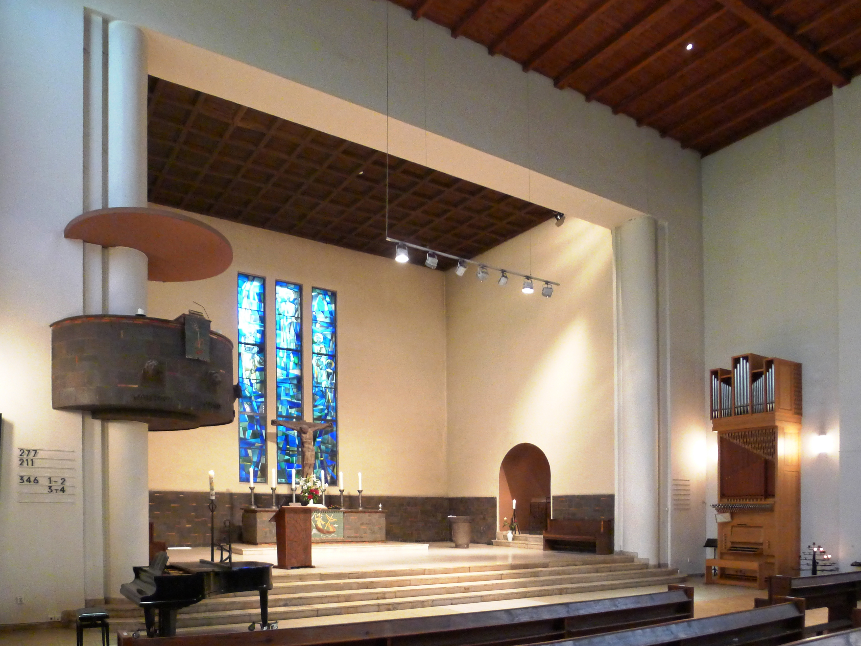 Kleine italienische Orgel an der Turmseite des Kirchenschiffs vor dem Triumphbogen zum Chor